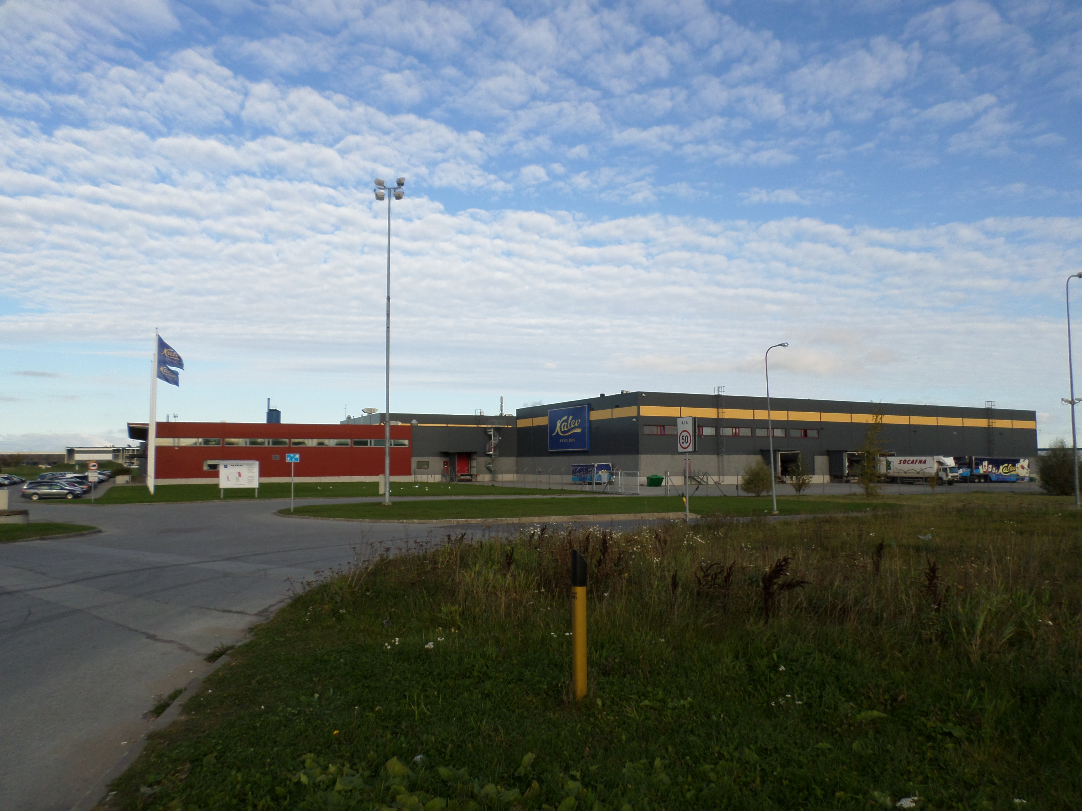 Kalevi tehas Rae vallas.